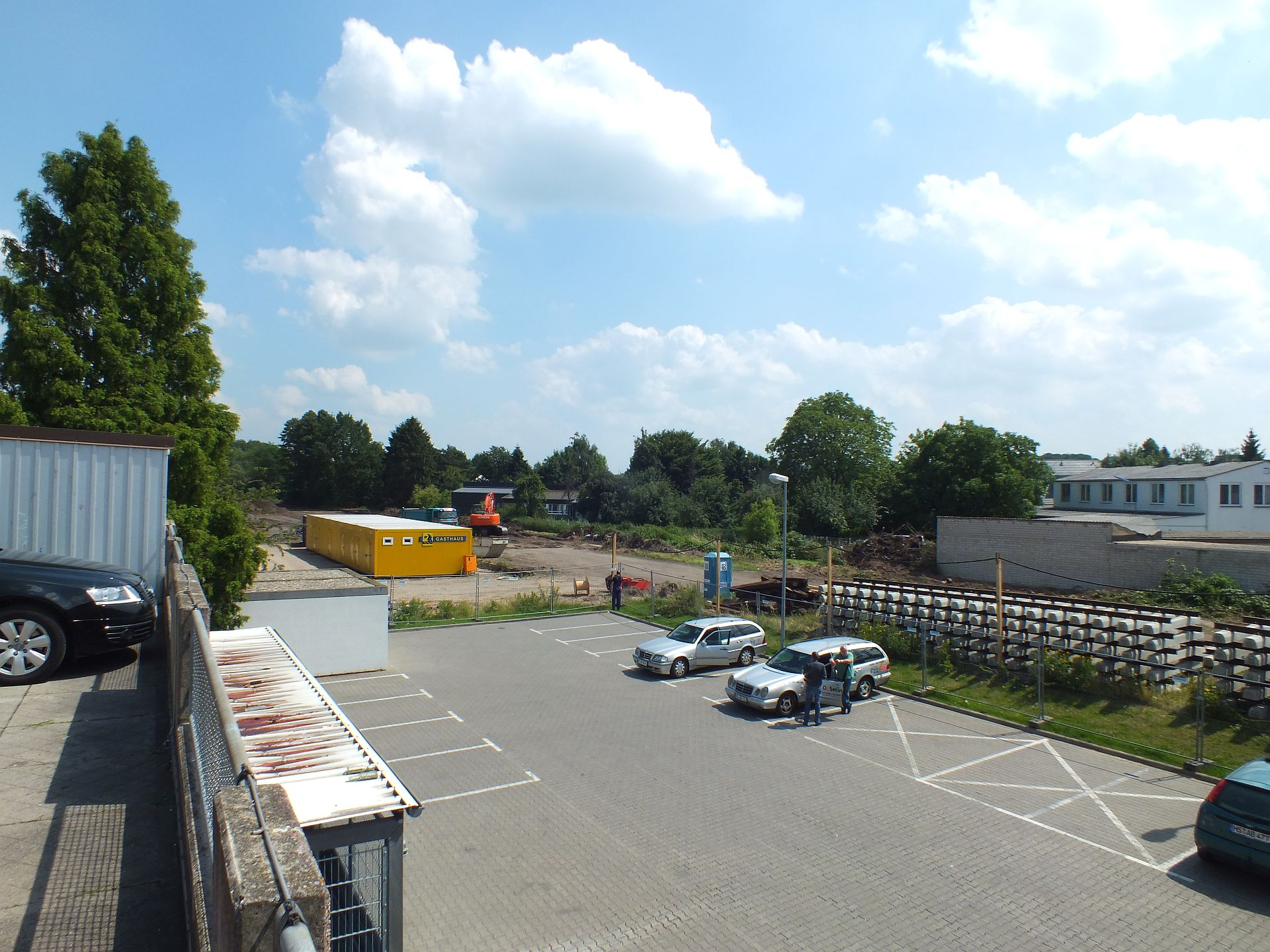 Reaktivierung Bahnhof Heinsberg